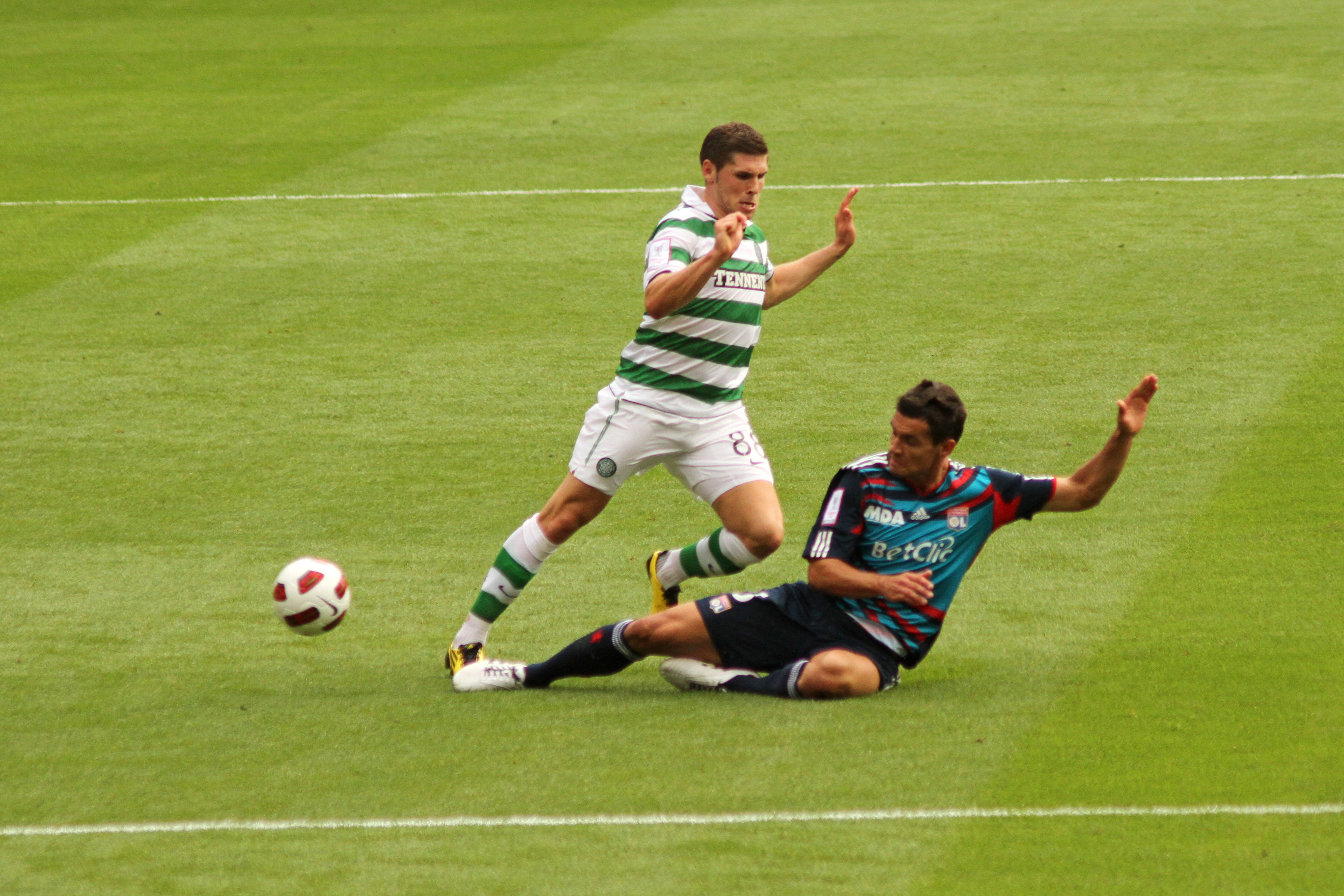 Gary Hooper & Dejan Lovren 2